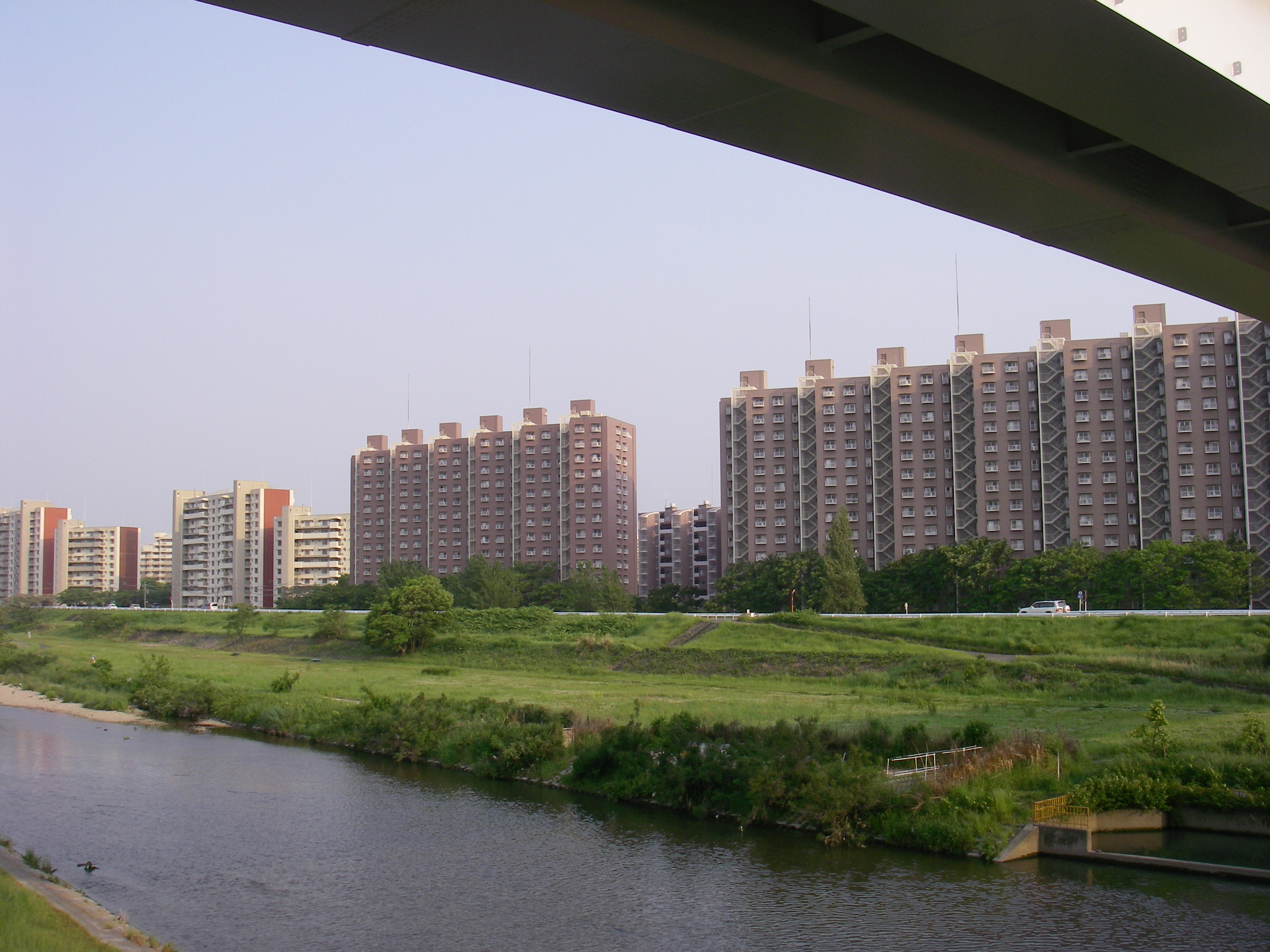 矢田川パークハウス（名古屋市東区砂田橋、画面中央右の2棟） 愛知県道30号関田名古屋線宮前橋上にて撮影、画面上部はガイドウェイバス志段味線、画面左奥はUR大幸東団地。